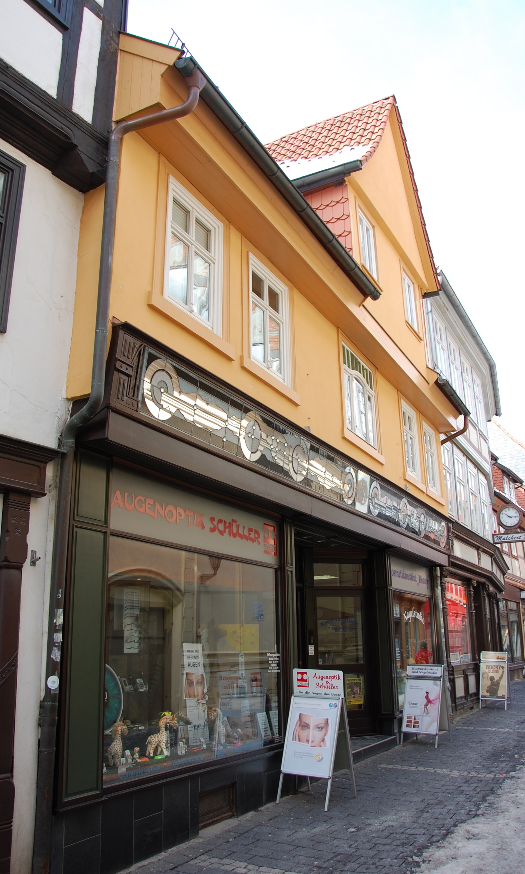 Haus Bockstraße 8in Quedlinburg